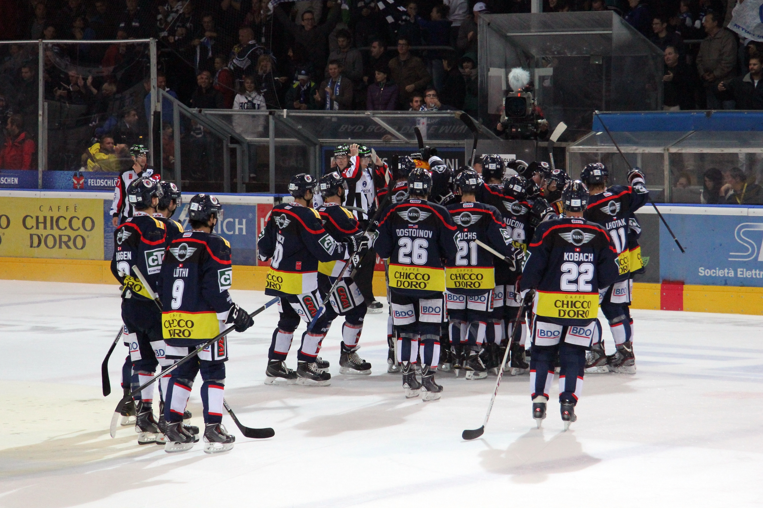 Équipe d'Ambrì-Piotta après la victoire.